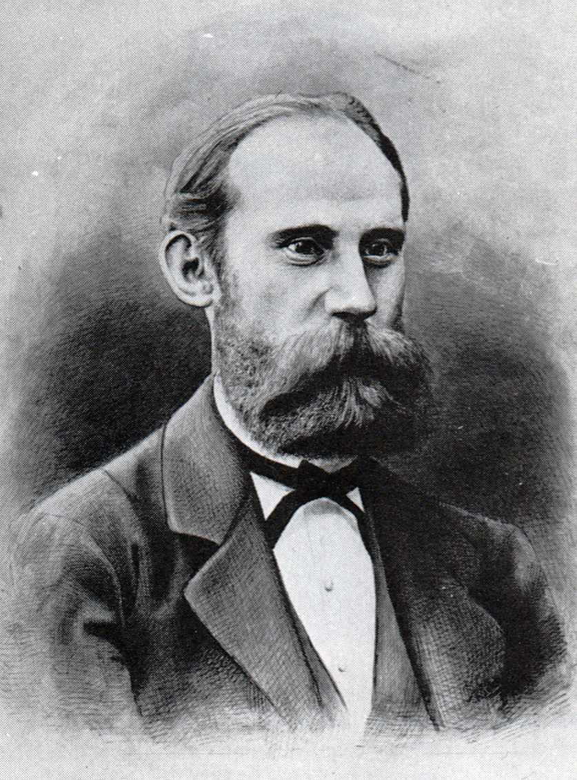 Wilhelm Meyer (1844-1944)